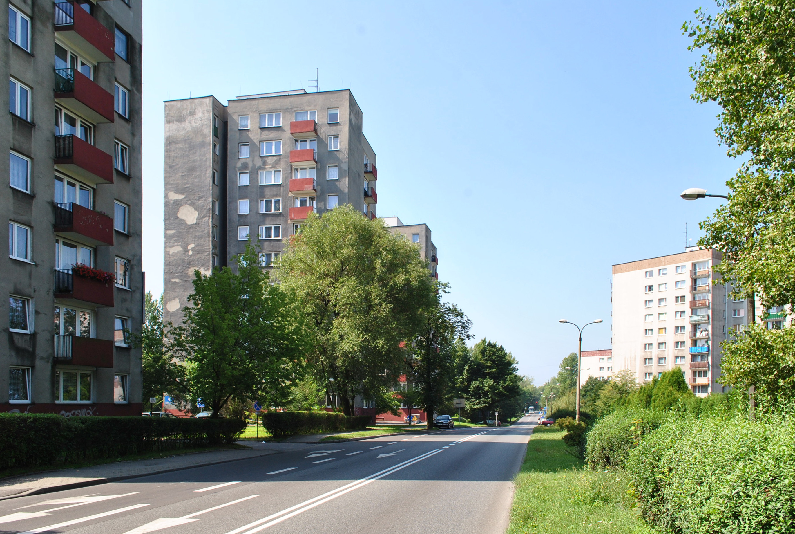 Katowice - Brynów. Ulica Ligocka na wysokości skrzyżowania z ul. Mikołowską i Brynowską